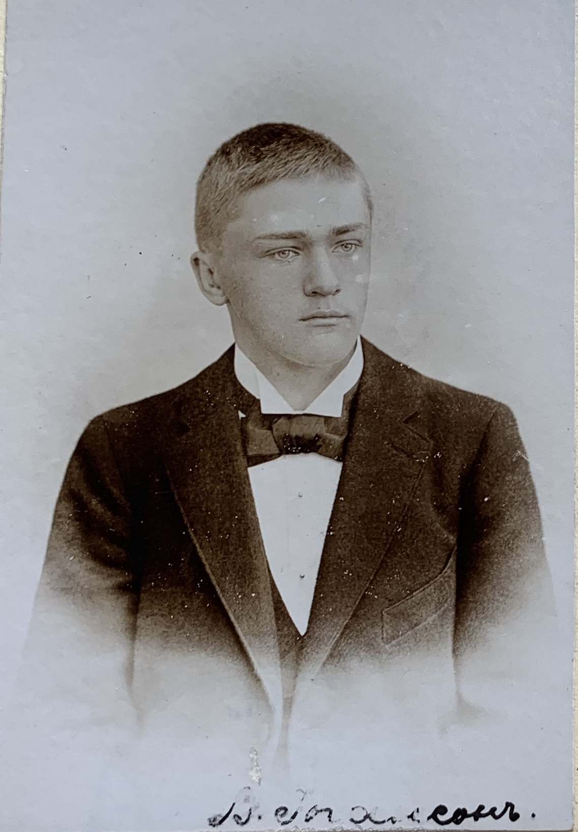 Viktor Johanson u 1898